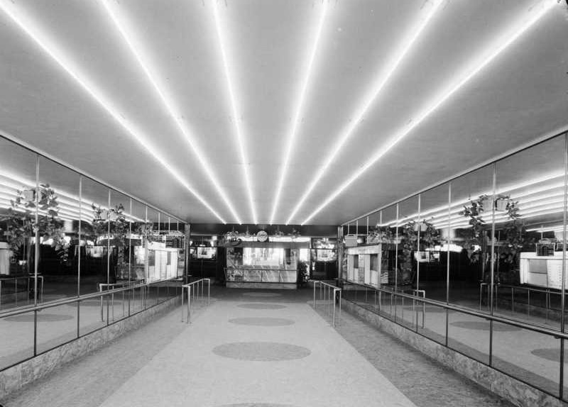 Klingenberg Kino interiør foaje 1952 Samlingsnr OB.Ø52 0922a Foto: Leif Ørnelund / Oslo Museum